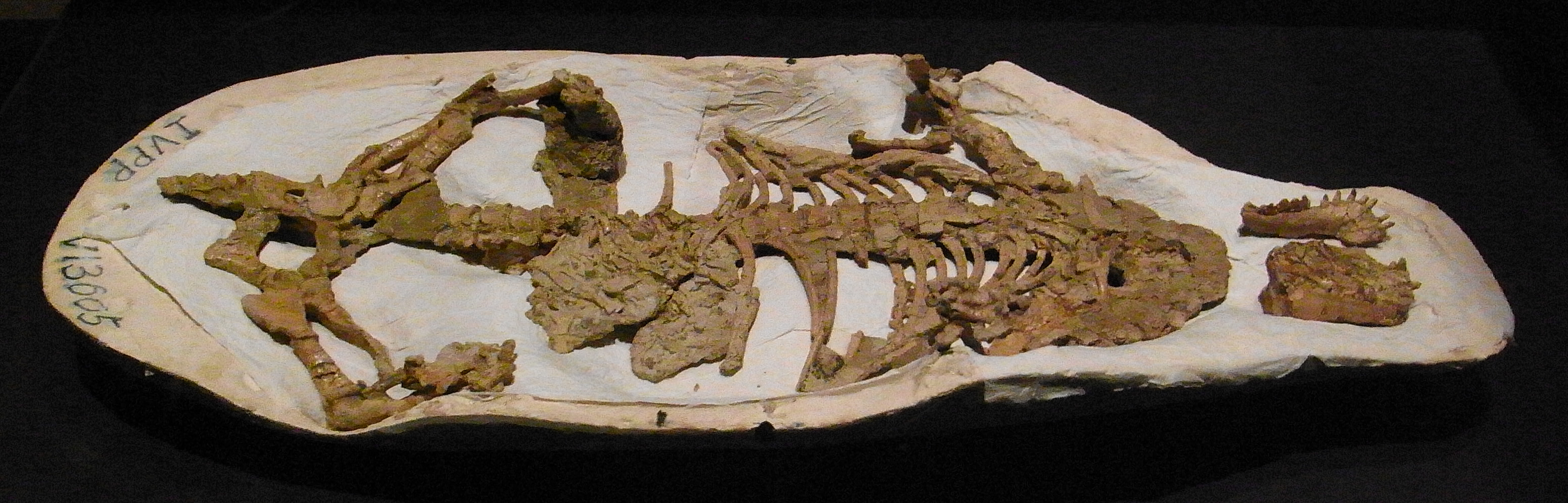 真ん中辺の塊が胃の中にあったプシッタコサウルスの子供の骨。